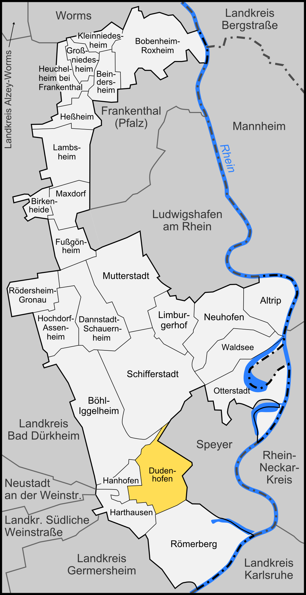 Karte der Gemeinde Dudenhofen im Rhein-Pfalz-Kreis